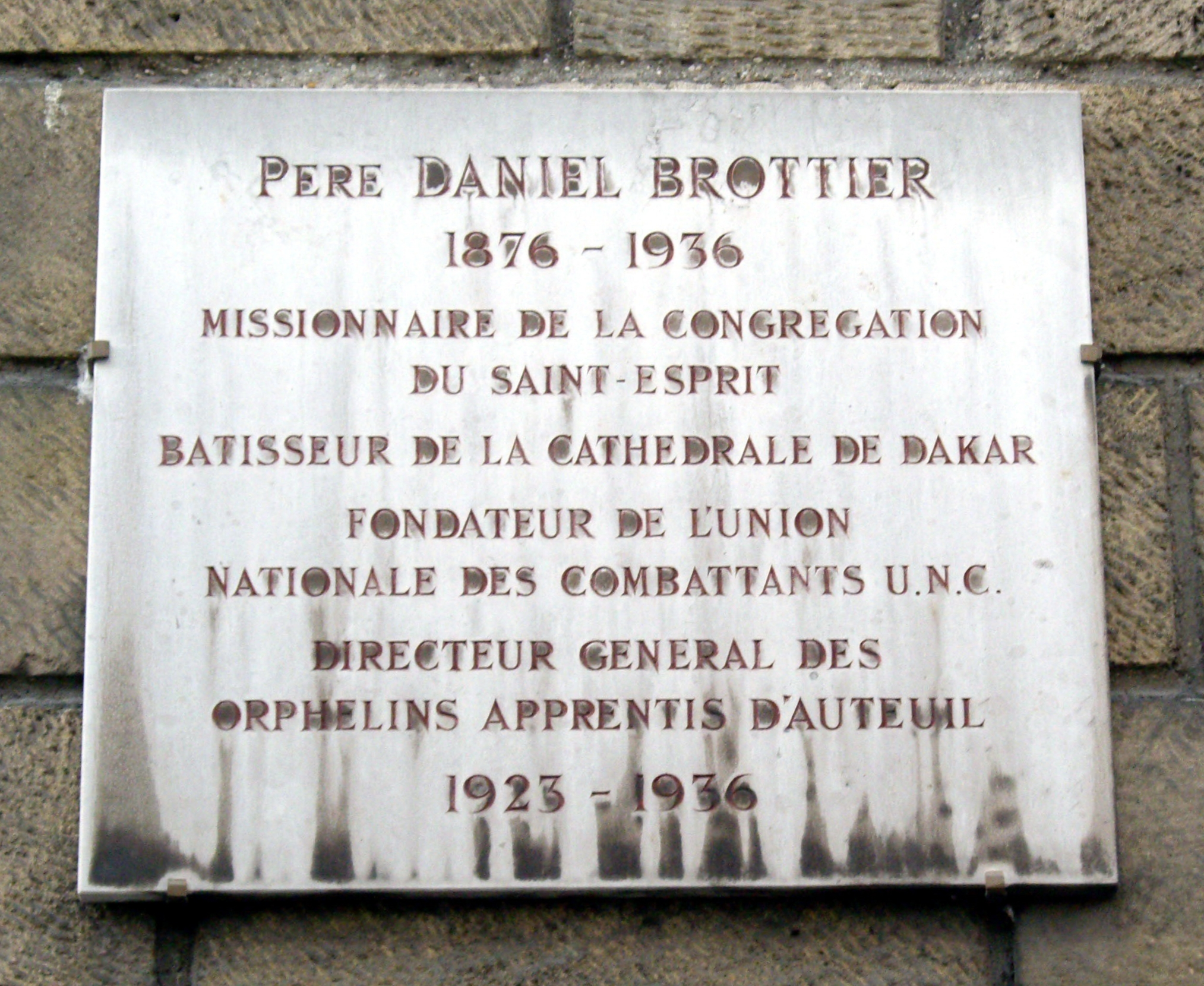 Plaque apposée sur la maison de la Fondation d'Auteuil, 42 rue Jean-de-La-Fontaine, Paris 16e, en mémoire du père Daniel Brottier (1876-1936), directeur général de la fondation de 1923 à sa mort.